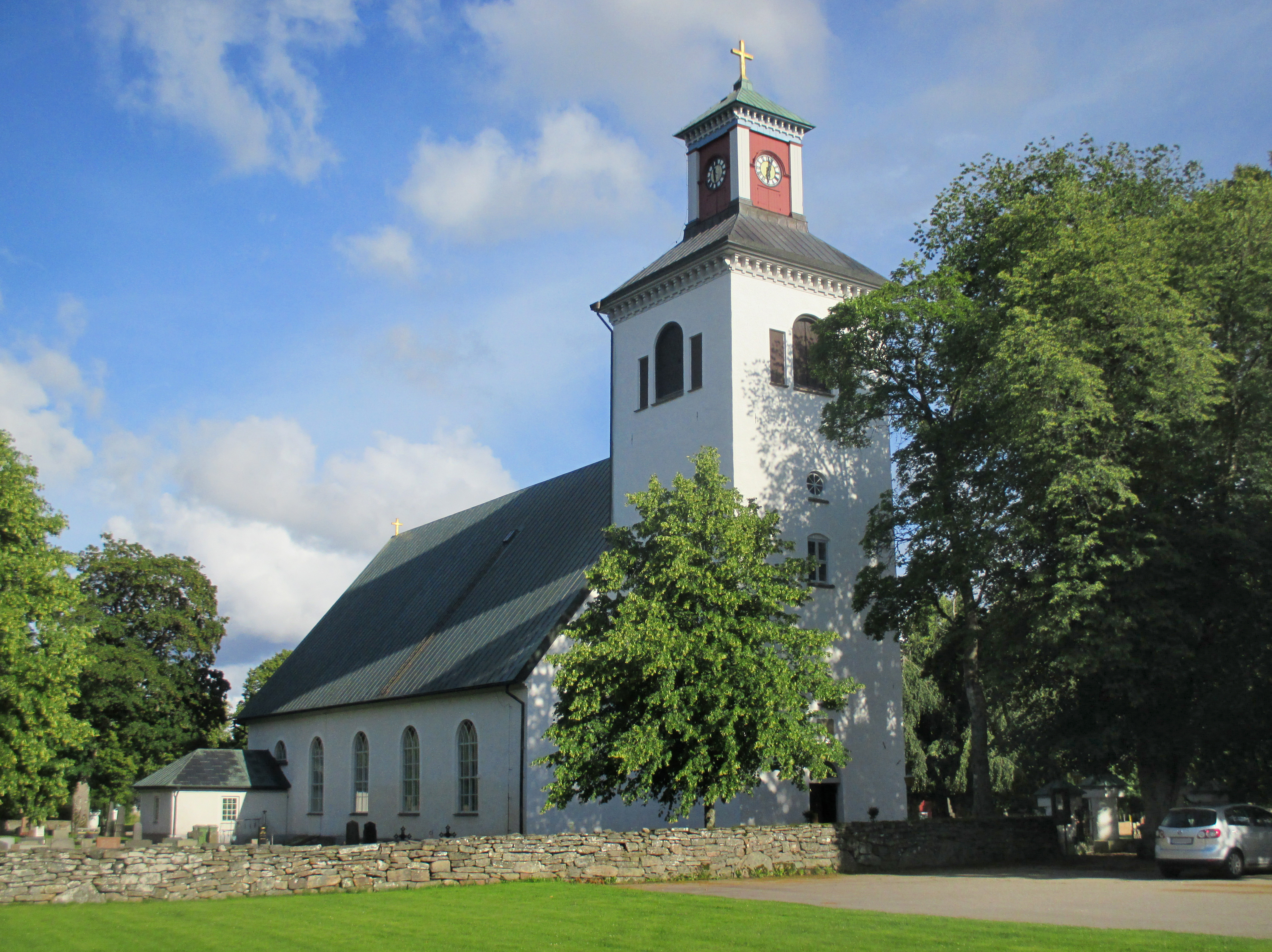 Södra Unnaryds kyrka i Södra Unnaryds socken, Hylte kommun, Hallands län, Småland, Sverige.